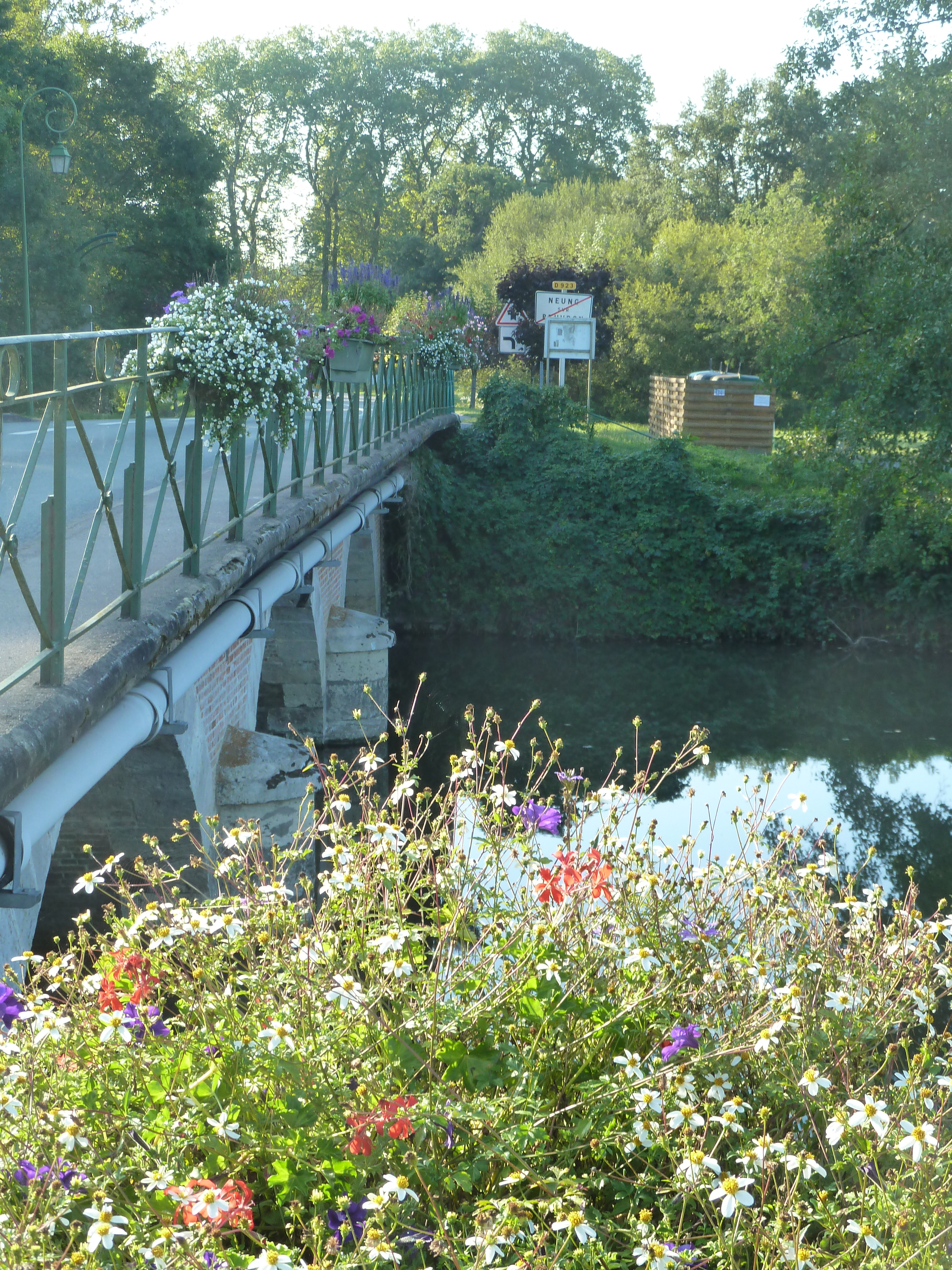 Le pont sur la Tharonne à Neung-sur-Beuvron, Loir-et-Cher, France